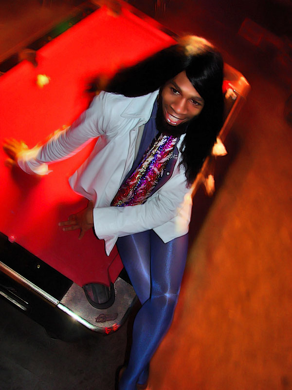 Andre J.